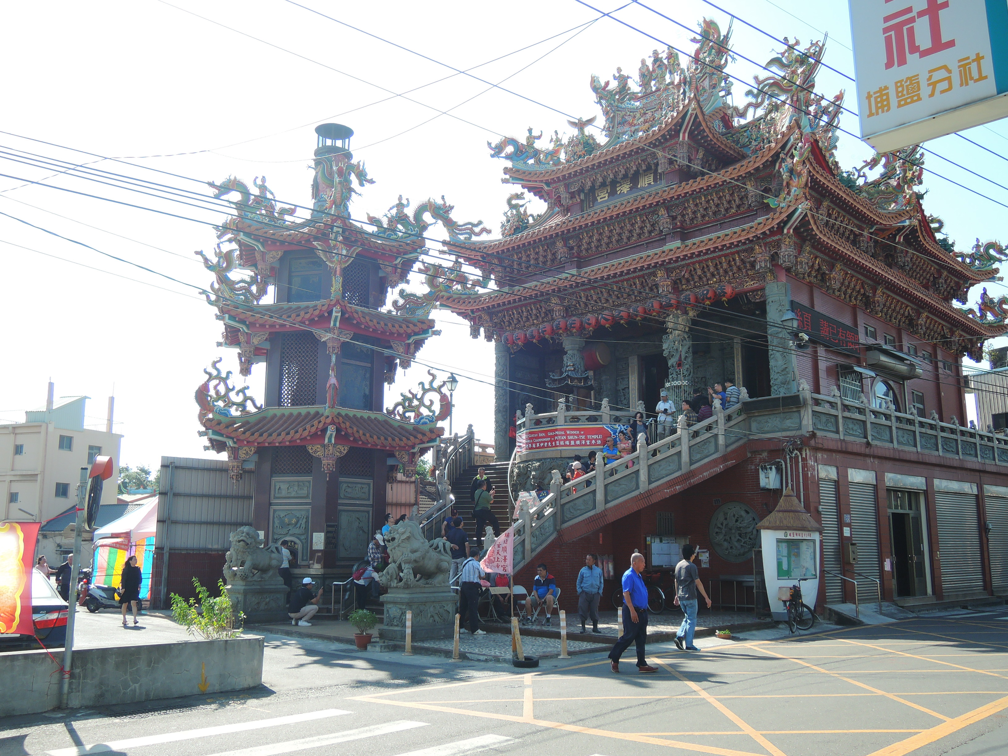 位於台灣彰化縣埔鹽鄉埔鹽村中正路55號